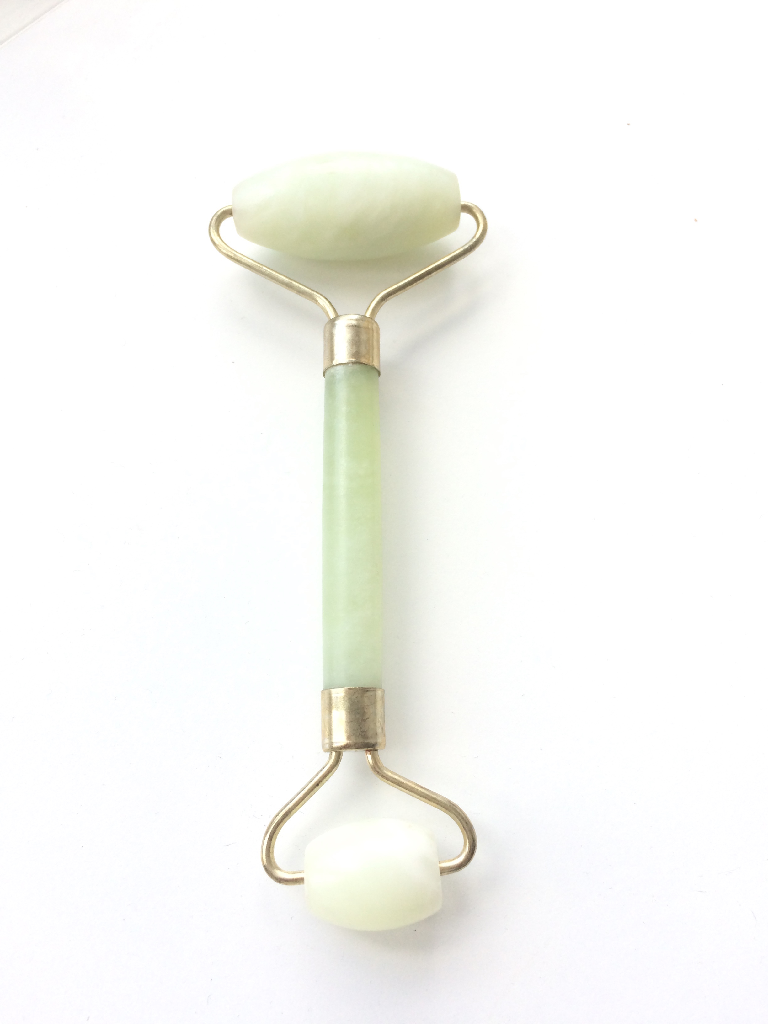 Kaksipäinen jaderulla